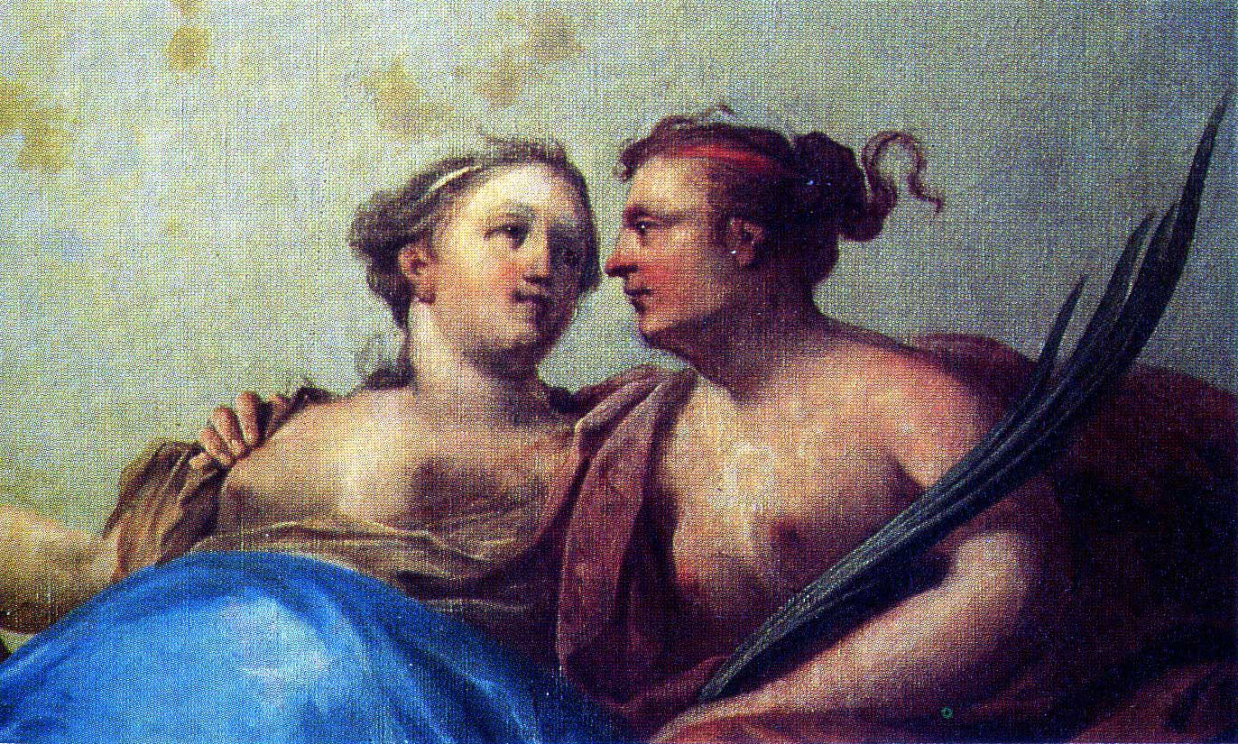 detail van een plafondschildering in het huis van burgemeester Willem van Strijen (1687-1765) Westhaven 52 te Gouda